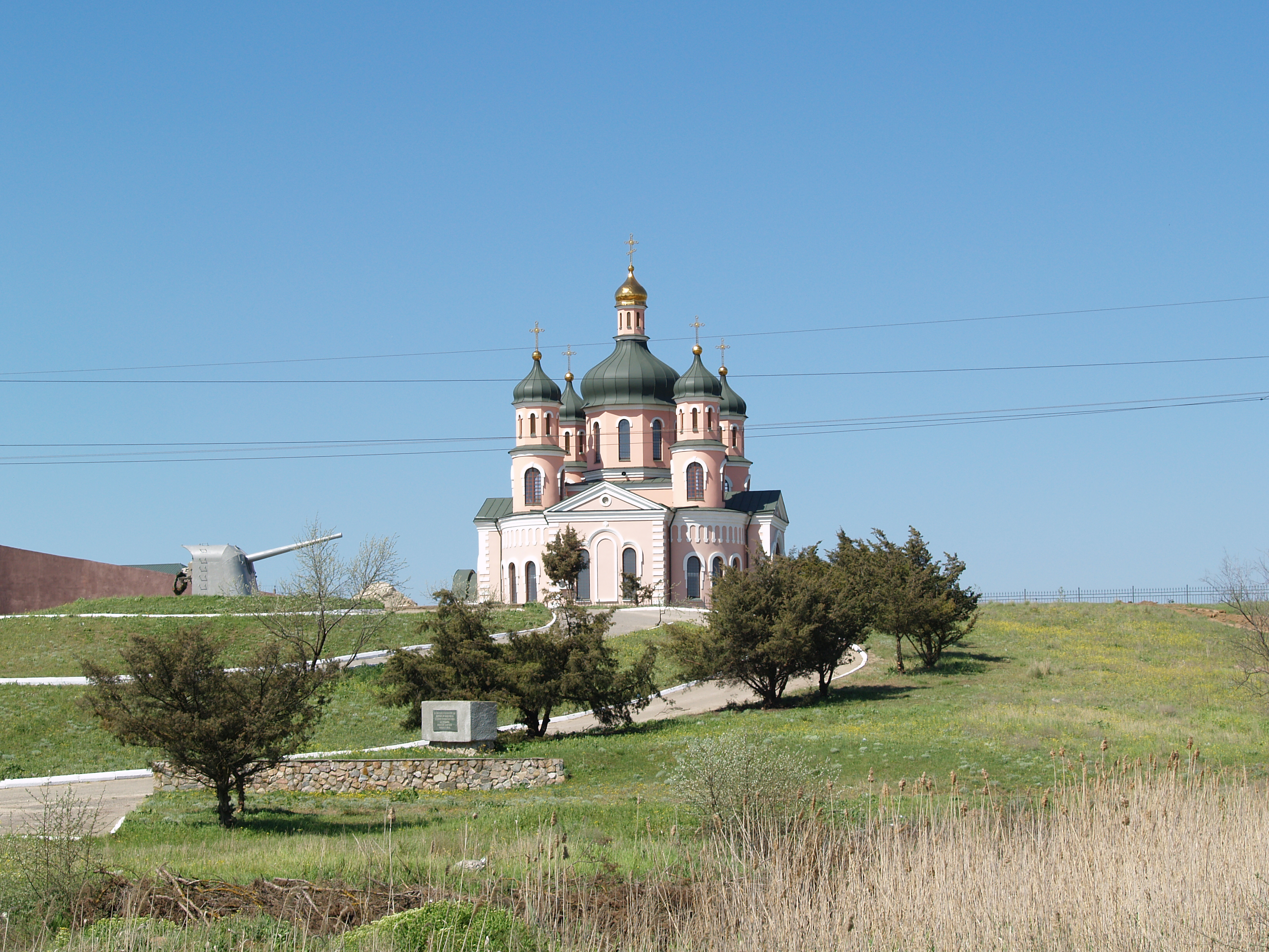 Heniches'ka Hirka, Khersons'ka oblast, Ukraine, 75581